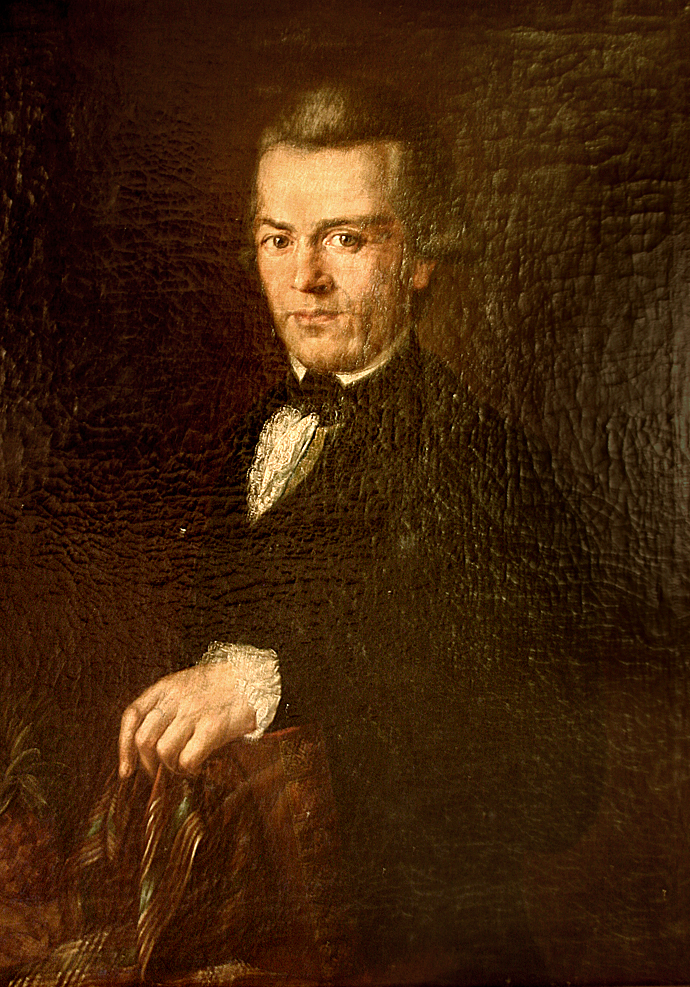 Johann Georg Steiner (Öl, um 1790)